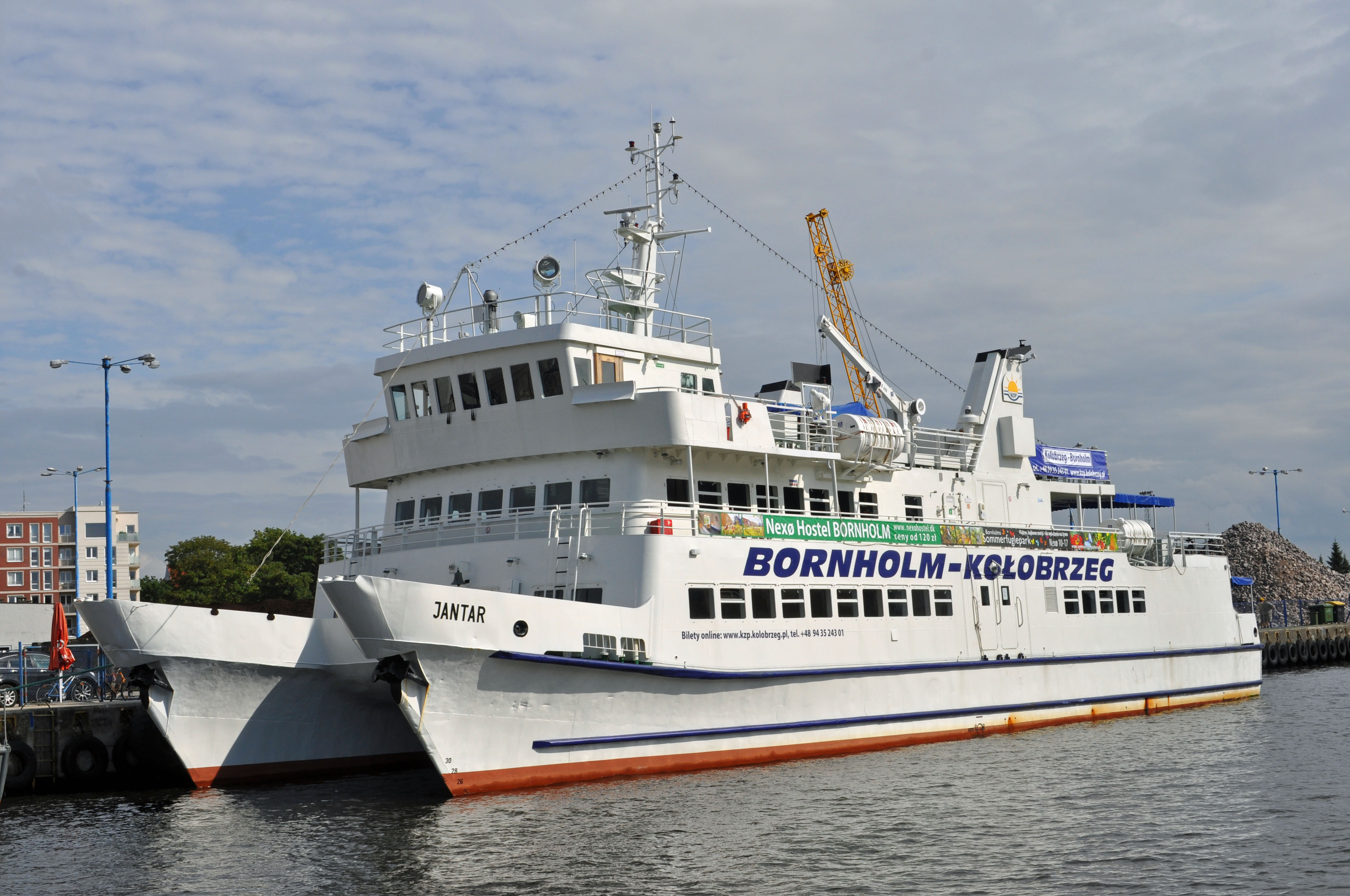 Aufgenommen in Polen im Juli 2011. Die Bilder tragen im Namen Ort und Objekt sowie das Aufnahmedatum.